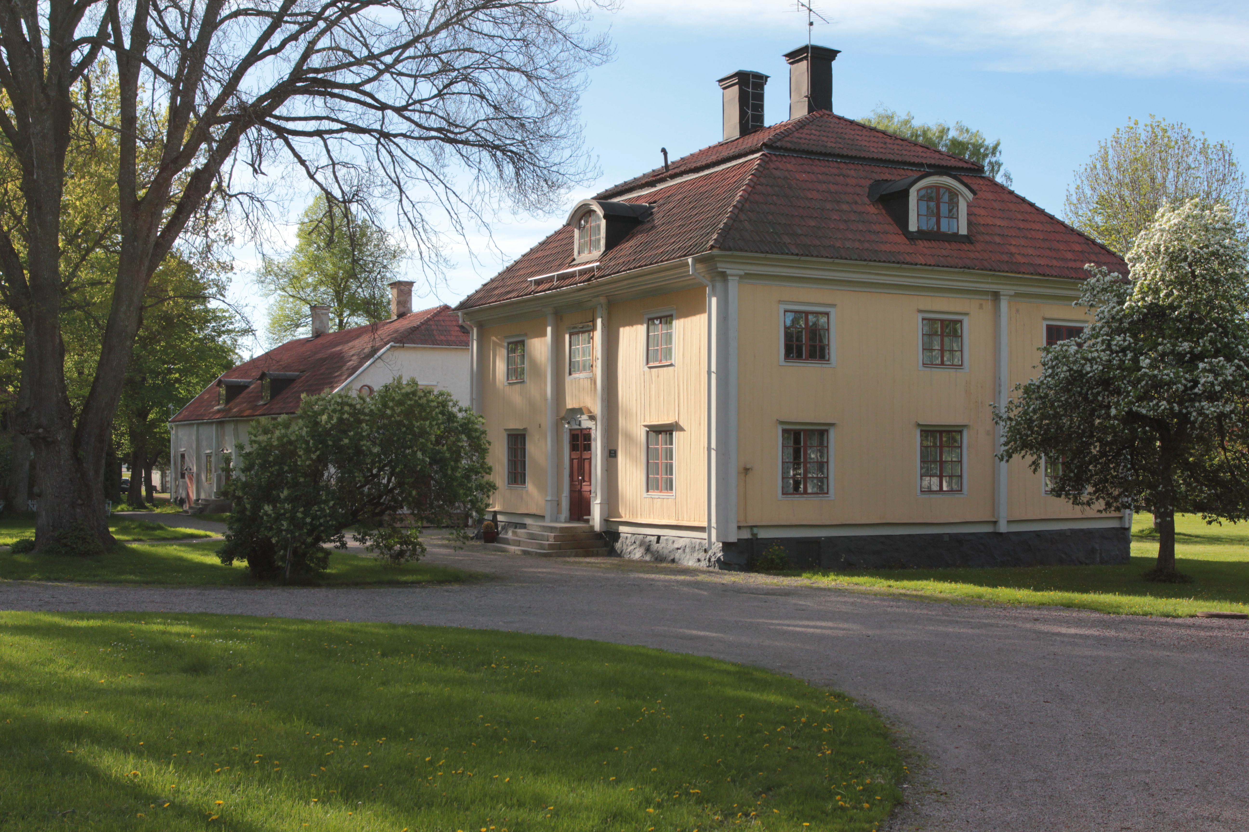 Herrgårdsflygel, Söderfors bruk. Foto uppladdat som en del i Bergslagssafarin 26 maj 2012.